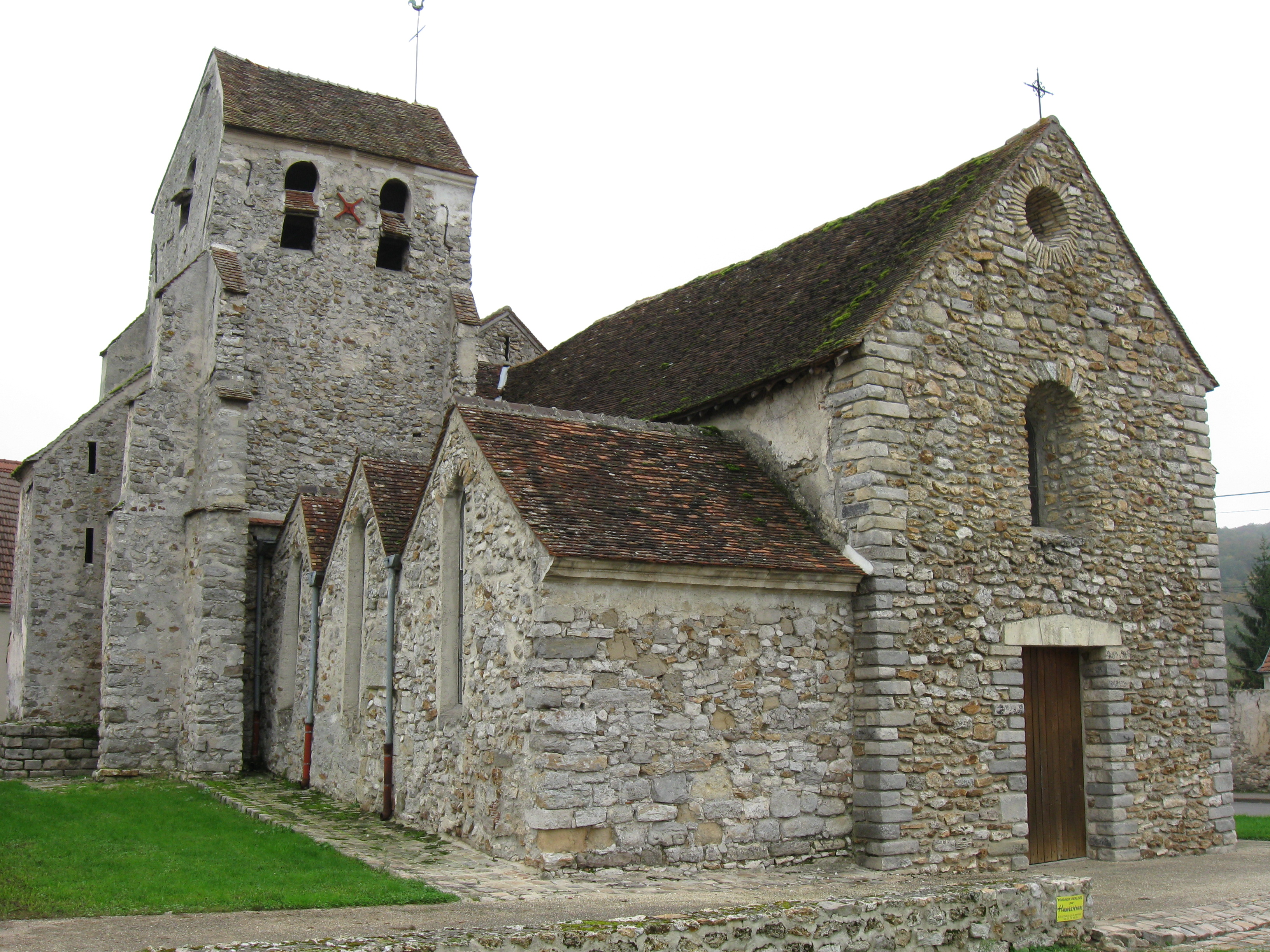 Église catholique saint Jean-Baptiste de Romeny-sur-Marne. (département de l'Aisne , région Picardie).